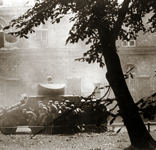 Atak na Pocztę Polską w Gdańsku 1.09.1939- samochód pancerny SS